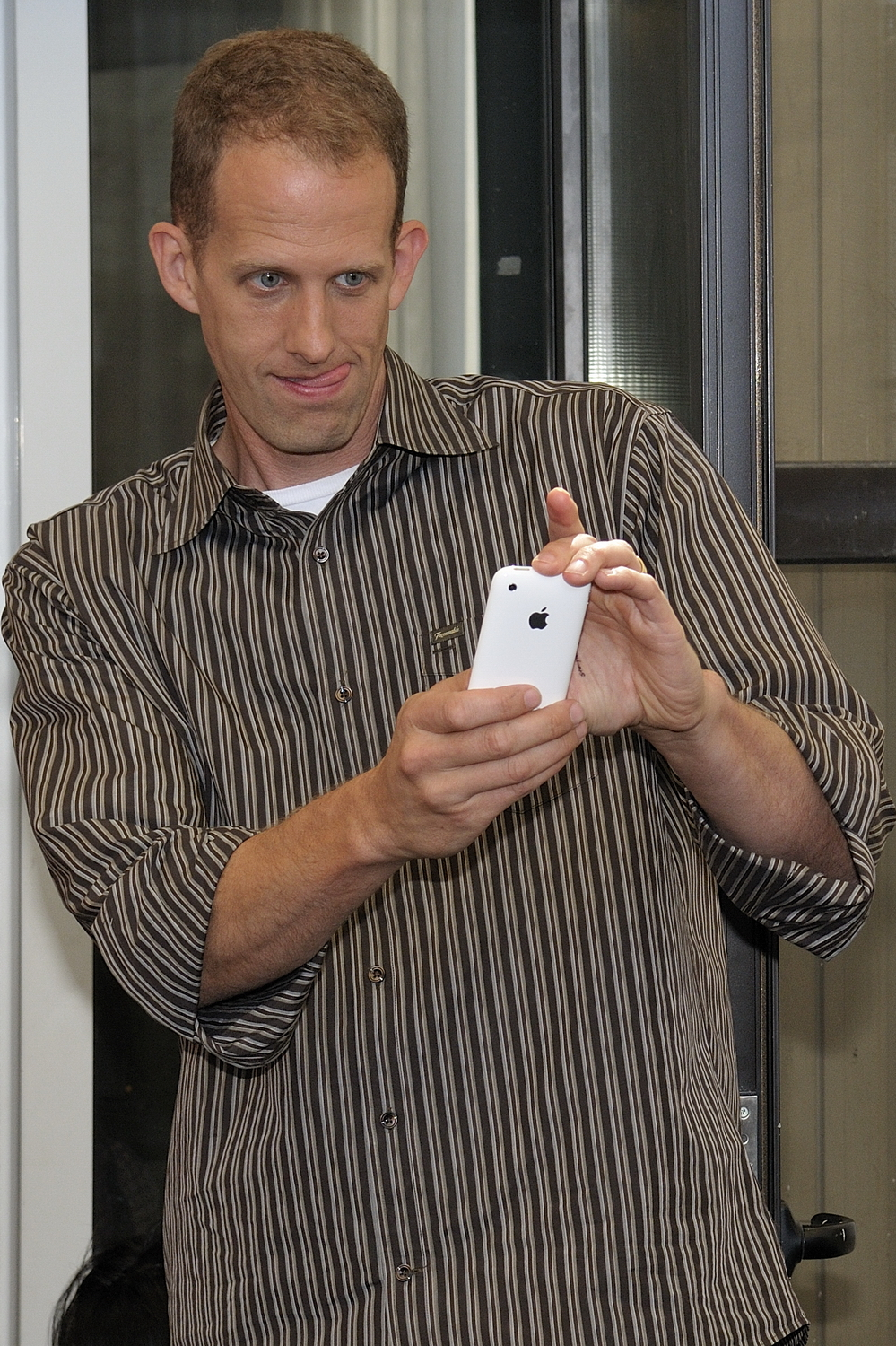 66ème Festival du Cinéma de Venise (Mostra), 5ème jour (06/09/2009) Geaorges Lucas et les réalisateurs de Pixar receoivent un Lion d'Or pour l'ensemble de leur carrière : John Lasseter (Toy Story, 1001 Pattes, Cars...), Brad Bird (Les Indestructibles, Ratatouille), Pete Docter (Monstres et Cie, Là-haut), Andrew Stanton (Le Monde de Nemo, WALL•E) et Lee Unkrich (Toy Story 2, Monstres et Cie, Le Monde de Nemo)